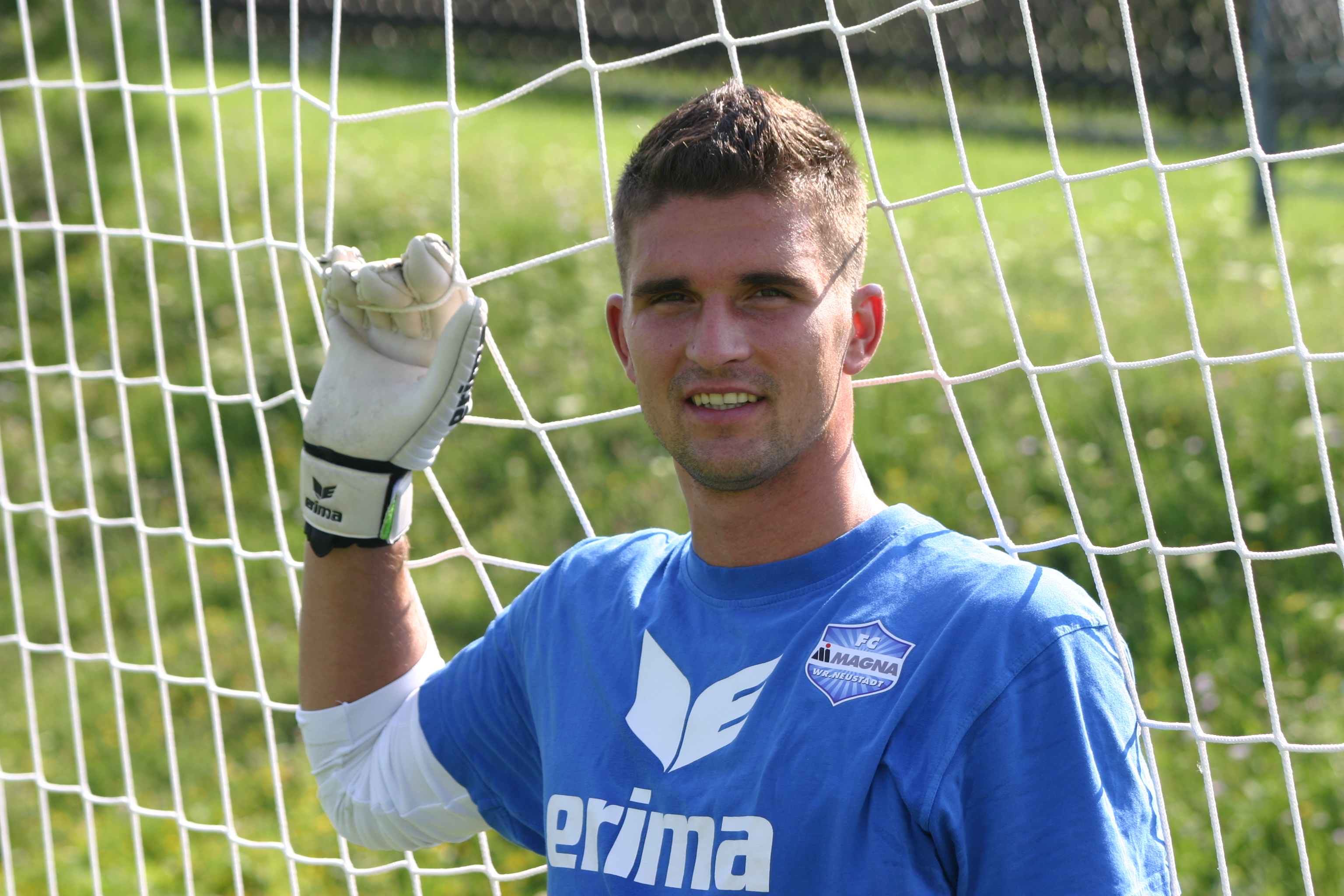 Sašo Fornezzi FC Magna Wiener Neustadt